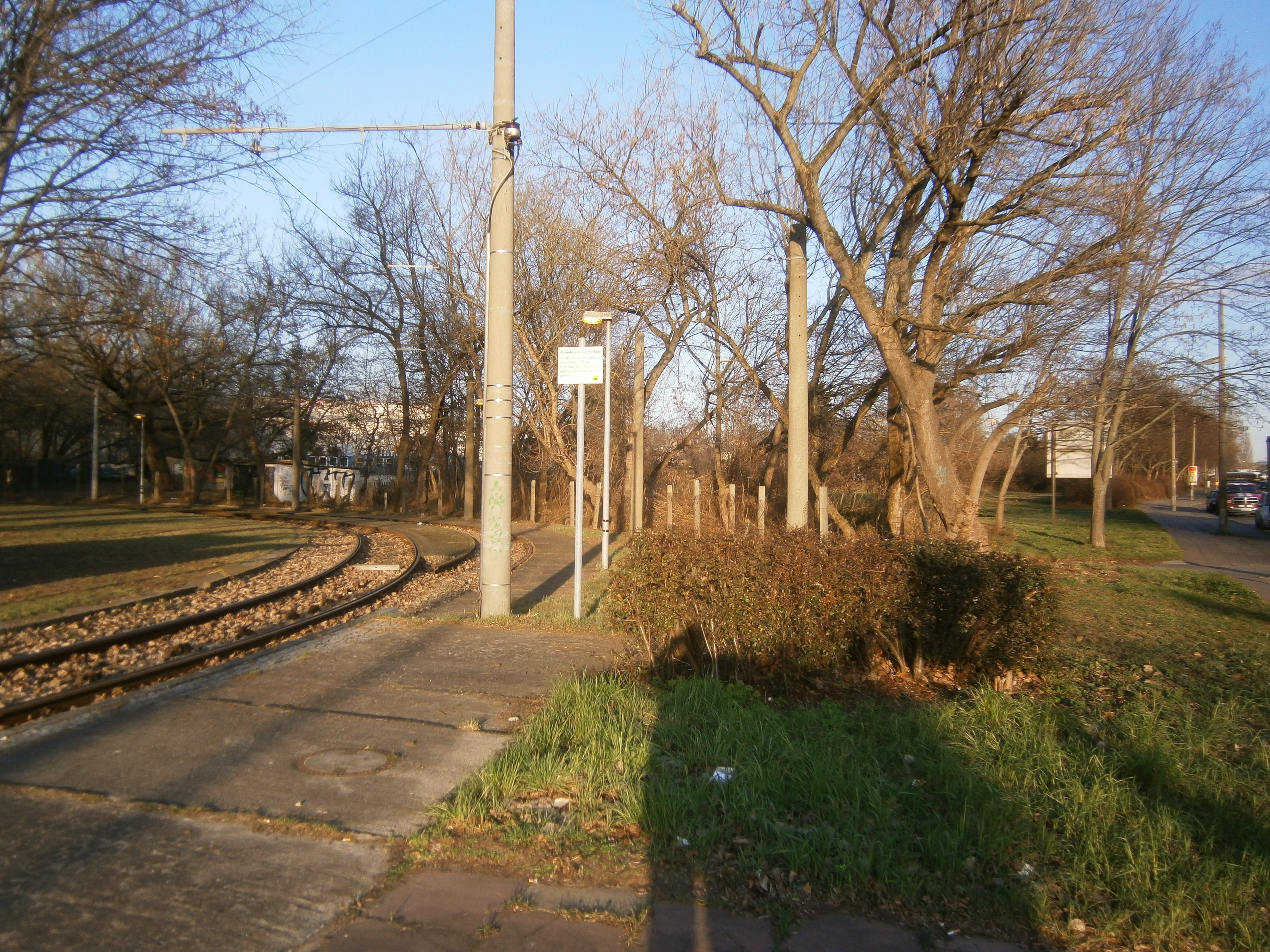 Die Hansastraße ist eine Berliner Straße mit übergeordneter Bedeutung in den Ortsteilen Alt-Hohenschönhausen und Weißensee. Sie liegt zwischen der Indira-Gandhi-Straße und der Großsiedlung Hohenschönhausen-Nord. Im Bild die Gleisschleife an der Buschallee (vormals Ecke Kniprodeallee), rechts im Bild die Hansastraße von der Buschallee nach Norden